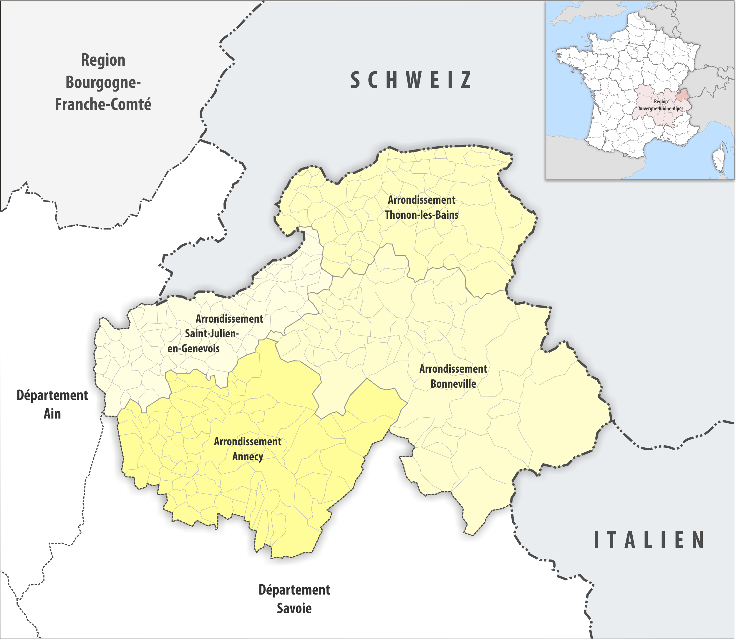 Gemeinden und Arrondissemente im Departement Haute-Savoie